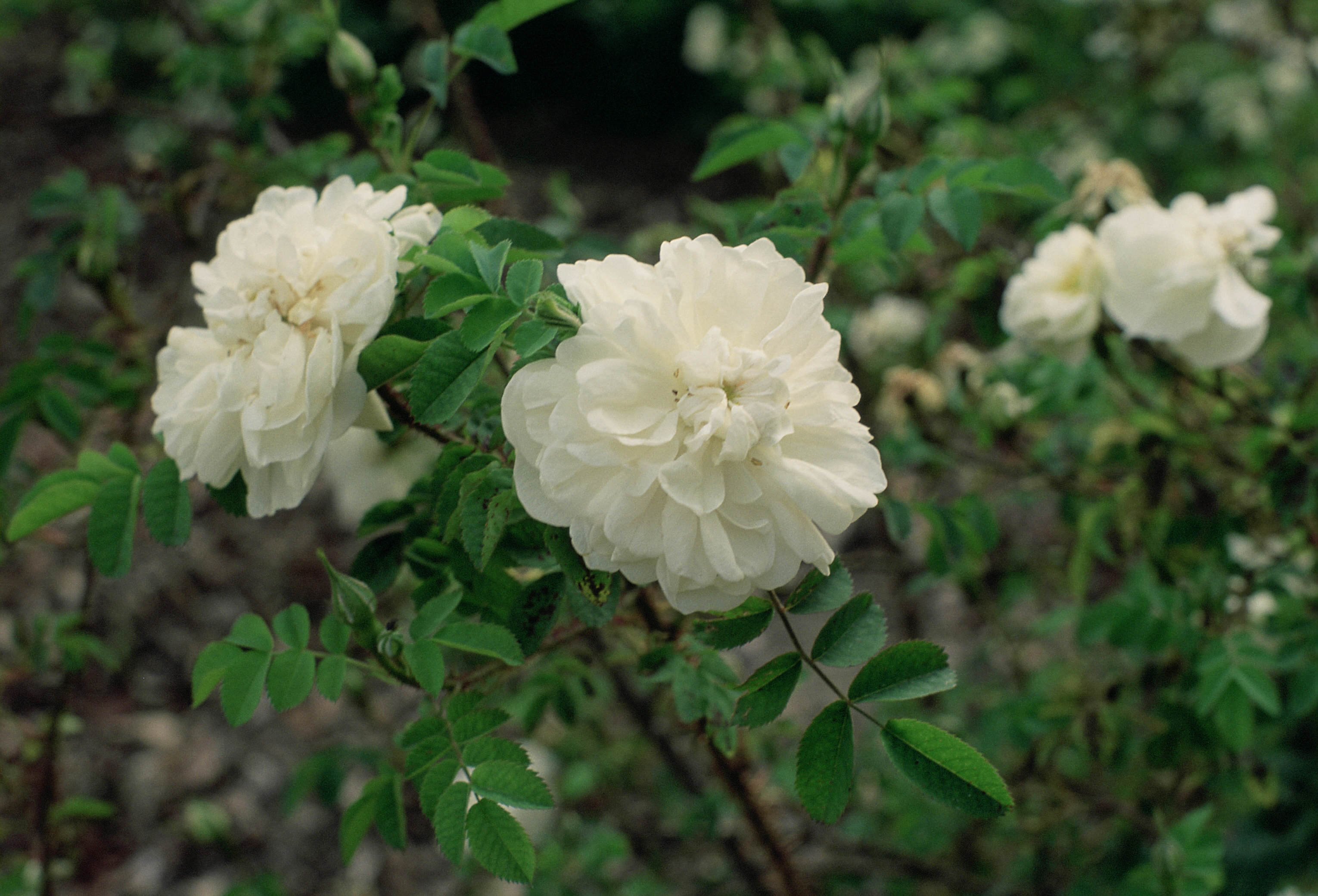 Rosa 'Stanwell Perpetual', sect. Pimpinellifoliae. Real Jardín Botánico, Madrid